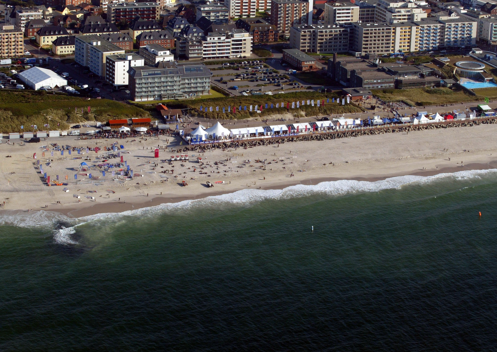 Brandenburger Strand aus der Luft